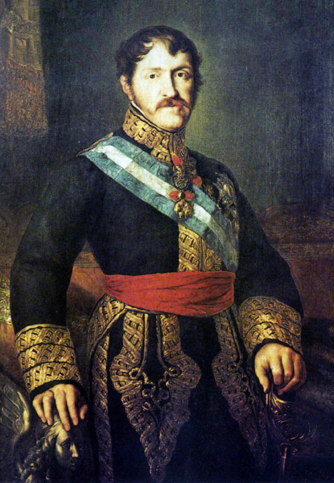 Retrato del infante de España Carlos María Isidro de Borbón (1788-1855), que fue hijo del rey Carlos IV de España y hermano de Fernando VII. Y a la muerte de este ultimo, disputó el trono de España a su sobrina, Isabel II, en el enfrentamiento conocido como la Primera Guerra Carlista, que finalizó en 1839 con el Abrazo de Vergara.